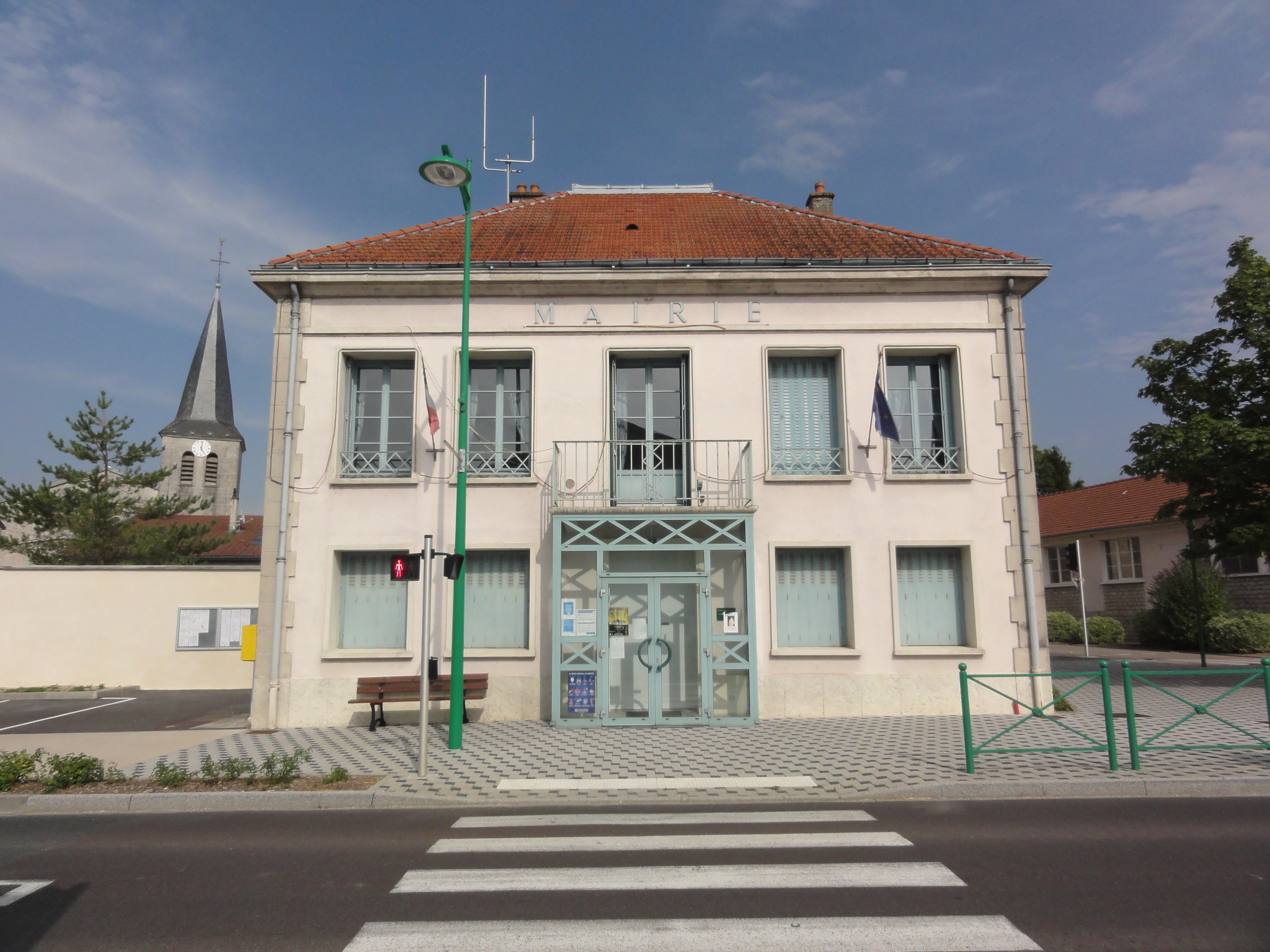 Haudainville (Meuse) mairie